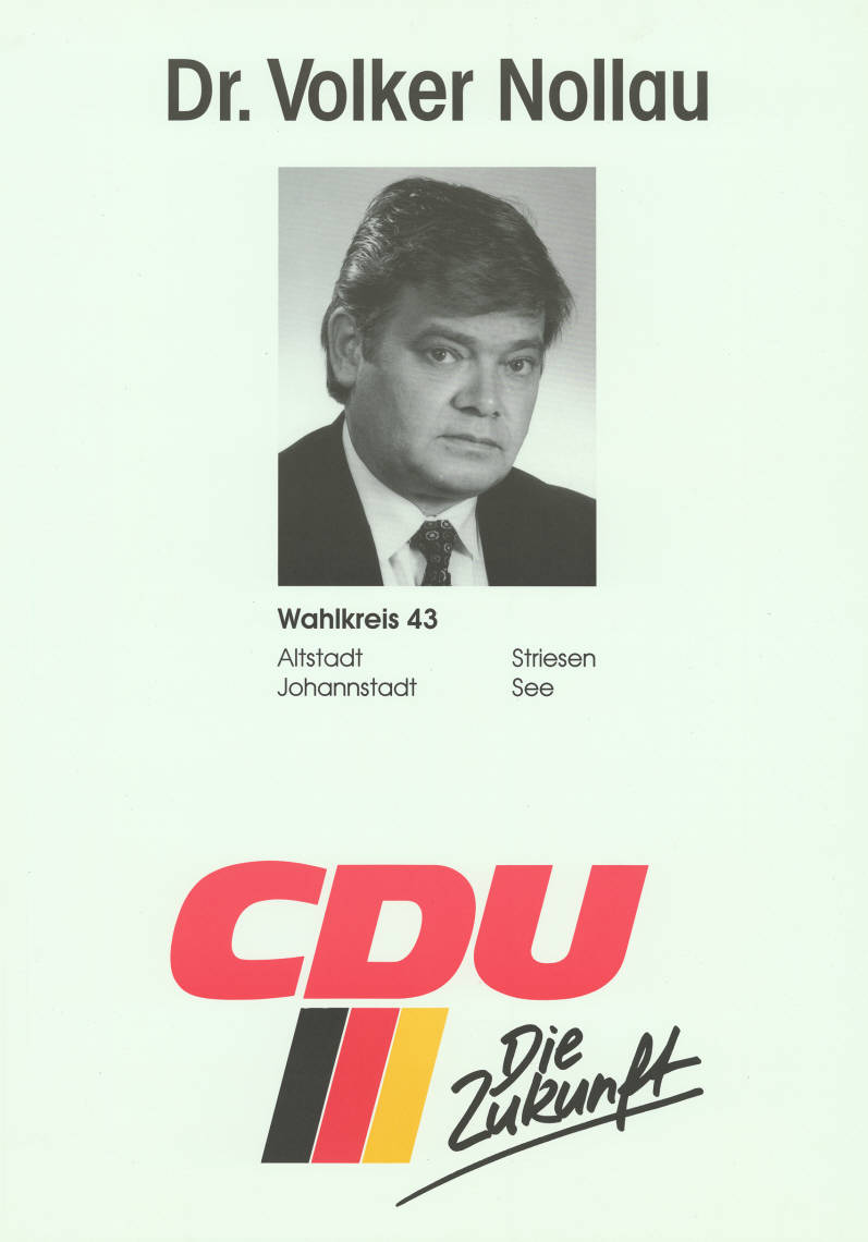 Dr. Volker Nollau Wahlkreis 43 ... CDU Die Zukunft Abbildung: Porträtfoto Plakatart: Kandidaten-/Personenplakat mit Porträt Objekt-Signatur: 10-035 : 3 Bestand: Landtagswahlplakate Sachsen (10-035) GliederungBestand10-18: Landtagswahlplakate Sachsen (10-035) » CDU Lizenz: KAS/ACDP 10-035 : 3 CC-BY-SA 3.0 DE